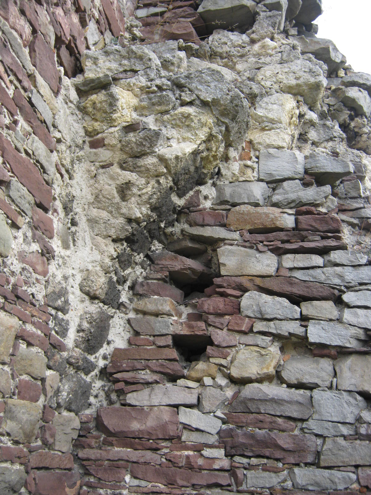 Залишки в'їзної арки. Фортеця. Бучач